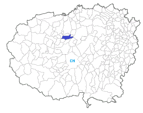 Posizione del comune nella provincia di Cuneo